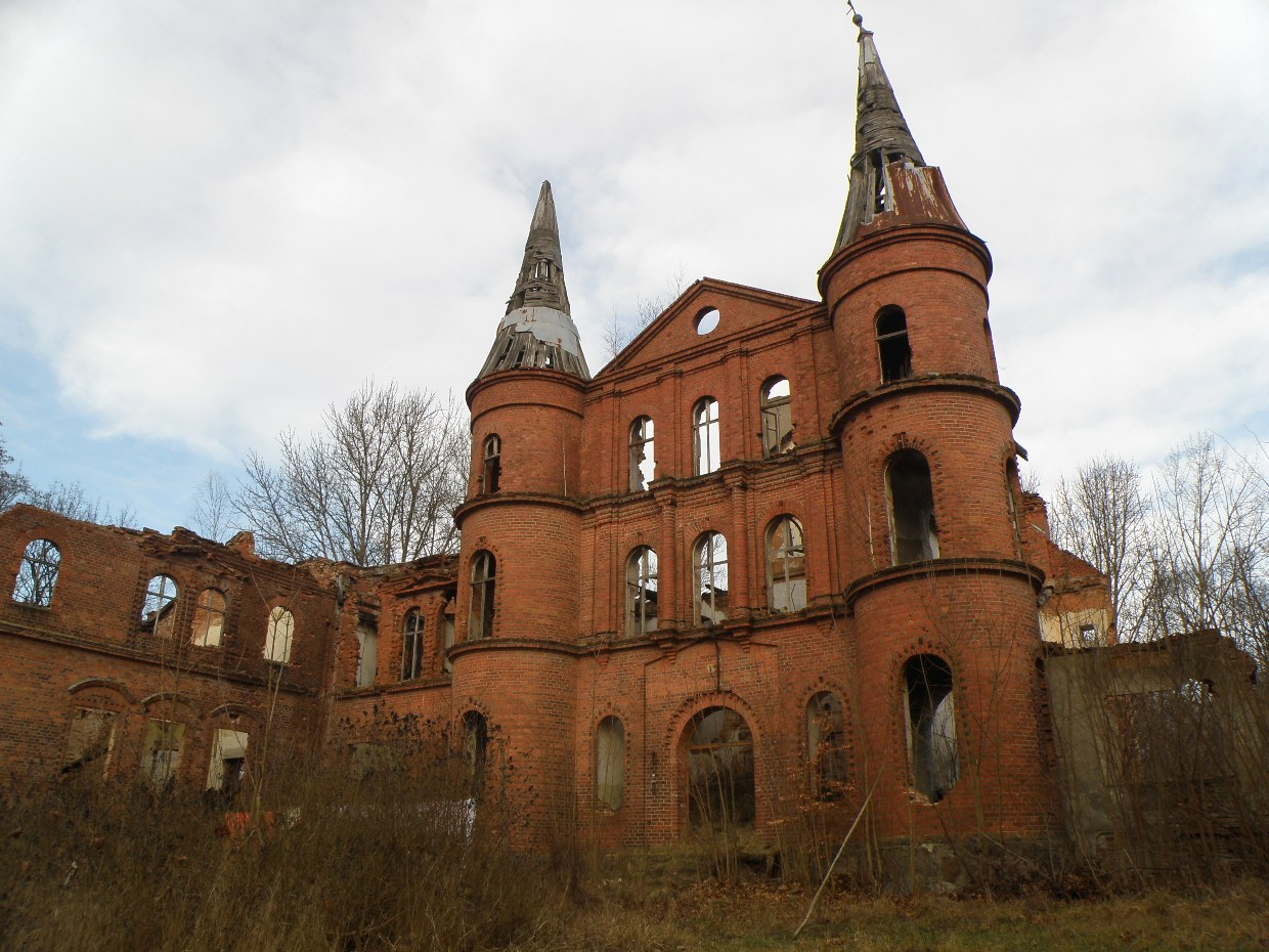 Ruiny pałacu w Juchowie, 1868-1874